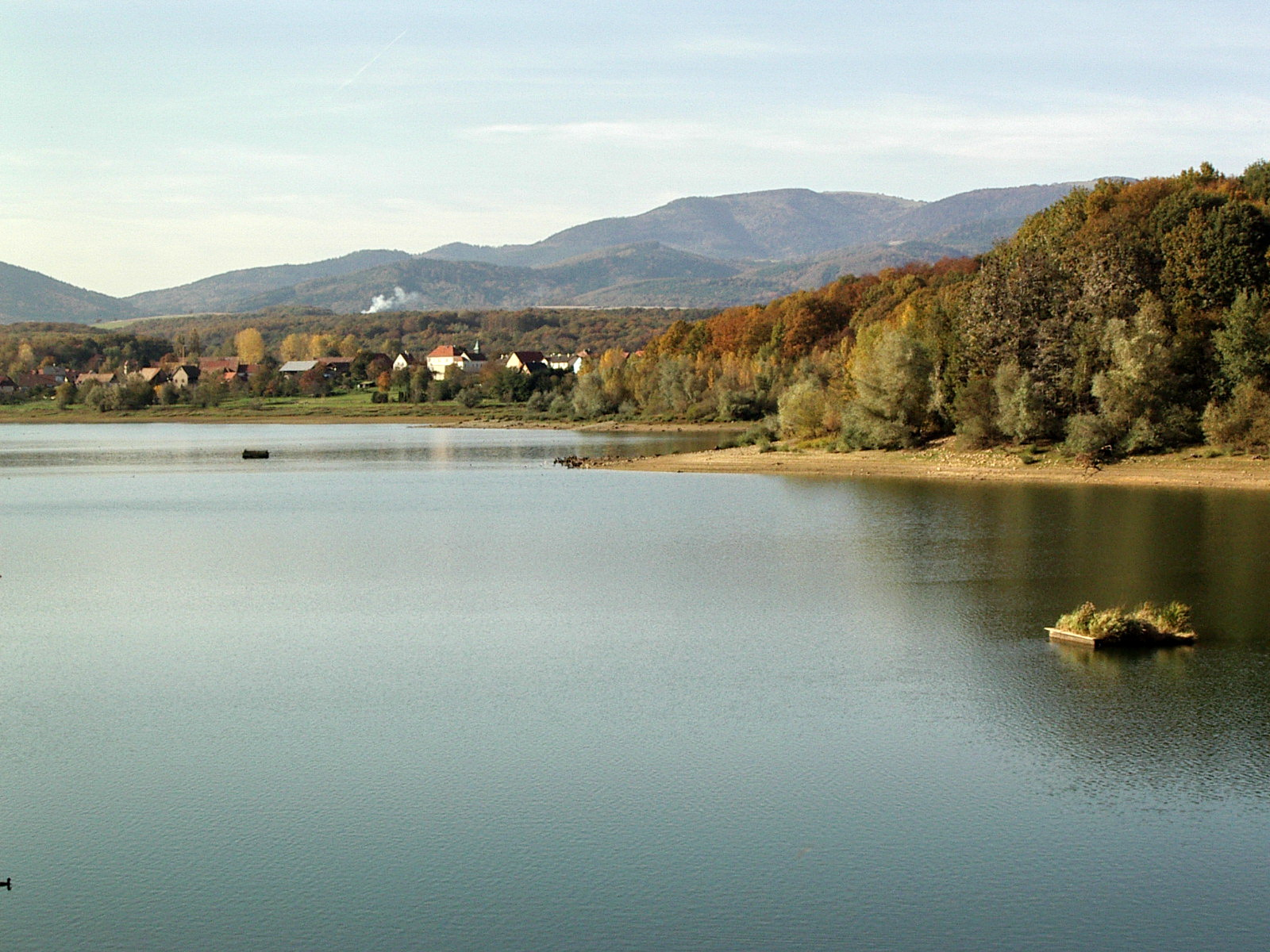 Plan d'eau de Michelbach, Haut-Rhin, France